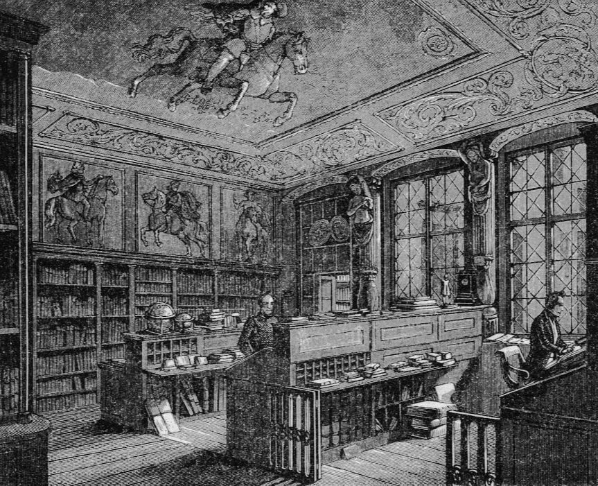 Księgarnia Ferdynanda Hirta Rynek 47 we Wrocławiu, rok 1848